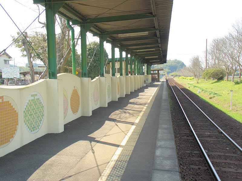 くま川鉄道湯前線ja:肥後西村駅 ホーム 写真奥がja:人吉駅方面。 この写真の前の版には、走行中の車内から撮影したホームの画像があります。 撮影者/著者/著作権保有者 : MK Products (本人がアップロード) 撮影日 : 2007/03/14 肥後西村駅用にアップロードした画像です。良い画像があれば別の画像に変えてください。